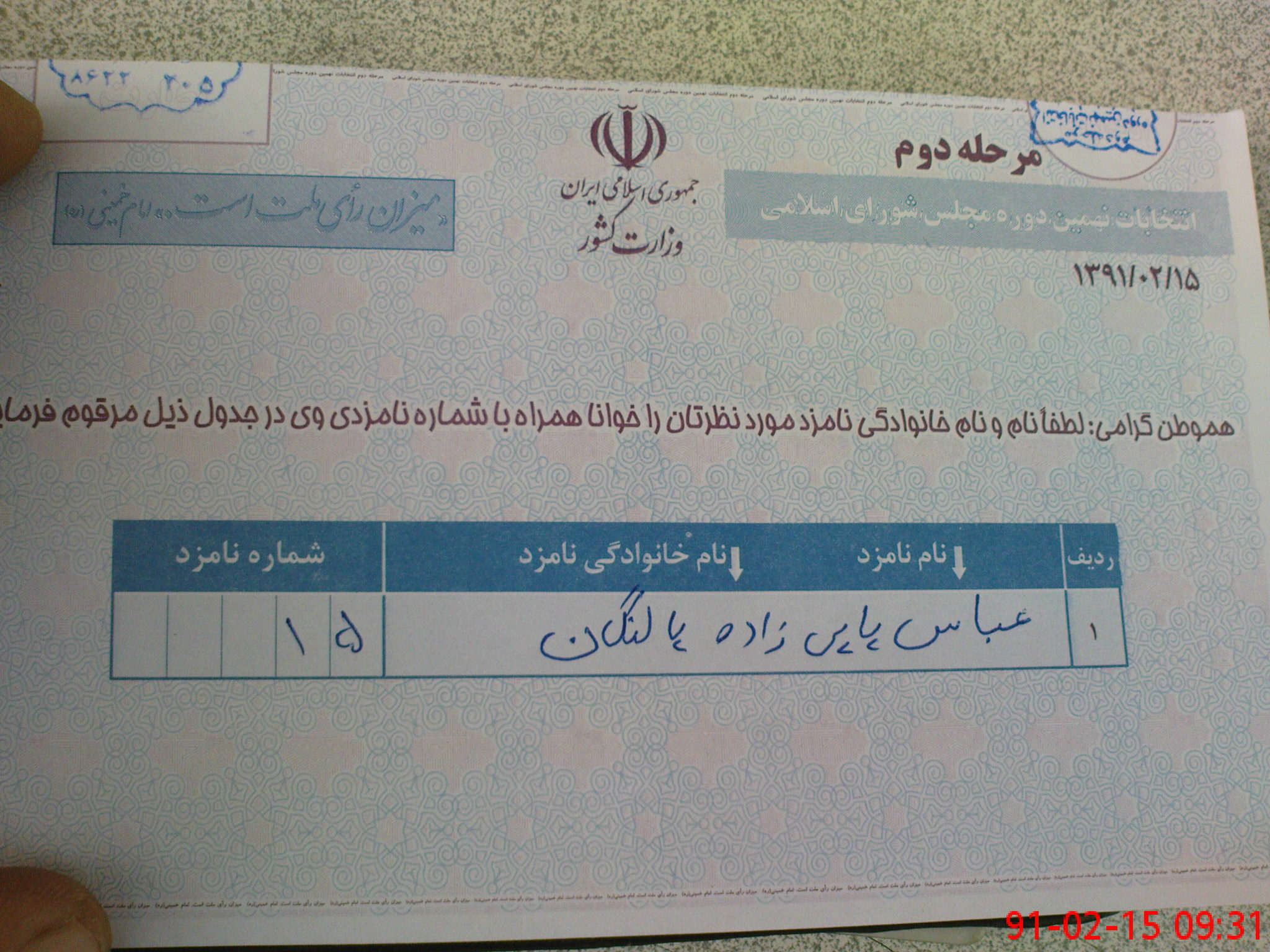 رای مردم دزفول به عباس پاپی زاده